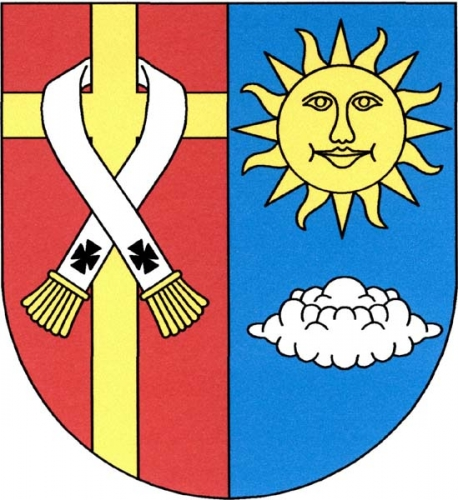 znak, Opařany, okres Tábor